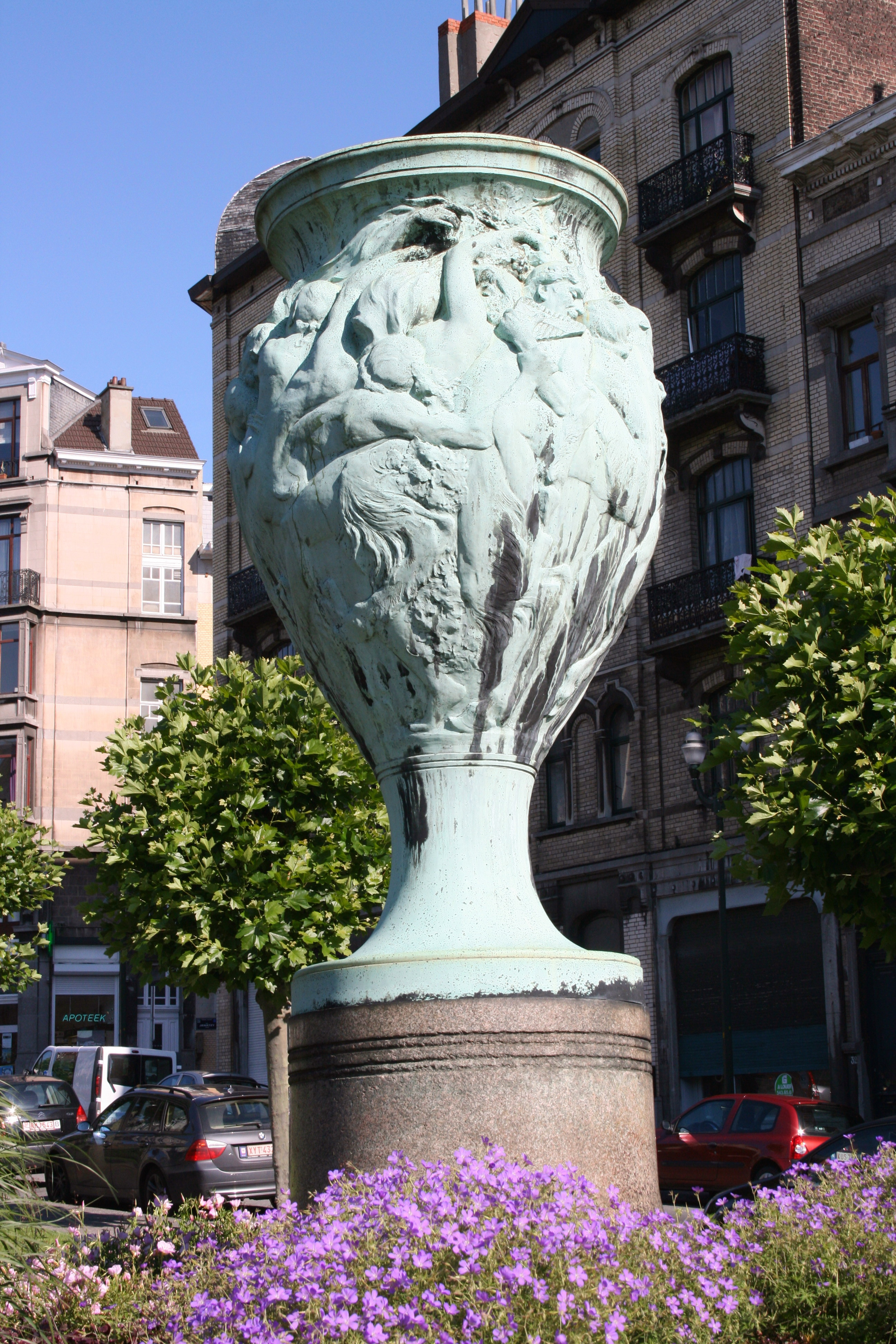 Vase installé avenue louis Bertrand, Schaerbeek (Bruxelles) à l'emplacement de l'ancienne église Saint-Servais